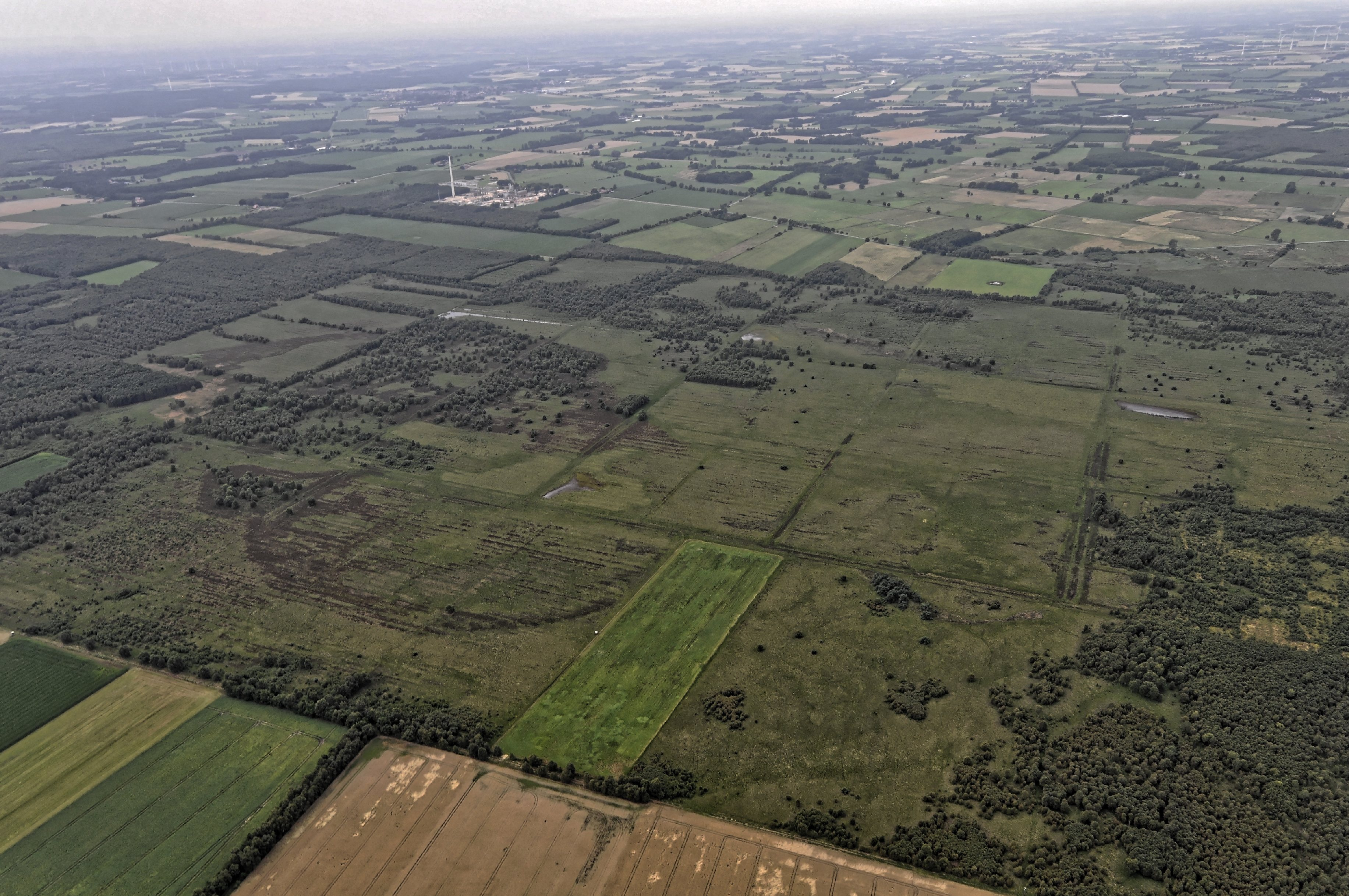 Bilder vom Flug Nordholz-Hammelburg 2015: Blick von Nordosten auf das Siedener Moor. Links im Hintergrund die ehemalige Erdgasverarbeitungsanlage im Ortsteil Voigtei von Steyerberg.